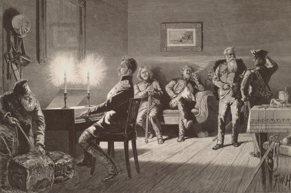 Theodor Körner am Abend vor seinem Tod im Gutshaus Gottesgabe bei Schwerin (25. August 1813); von links nach rechts ein Kosacke, Theodor Körner, Friedrich Friesen, Adolf von Lützow, Fritz Helfritz, Joseph Fischer, Anton Probsthan. Holzstich, ca. 1880, nach Gemälde von Friedrich Wilhelm Heine (1845–1921). Veröffentlicht in Theodor Körner am 25. August 1813 zu Gottesgabe in Mecklenburg-Schwerin, am Vorabend seines Todes. Holzstich von M. Weber nach Gemälde von F. W. Heine. Erscheinungsdatum: 1881. Auch in der Deutschen Illustrirten Zeitung vor 1900.